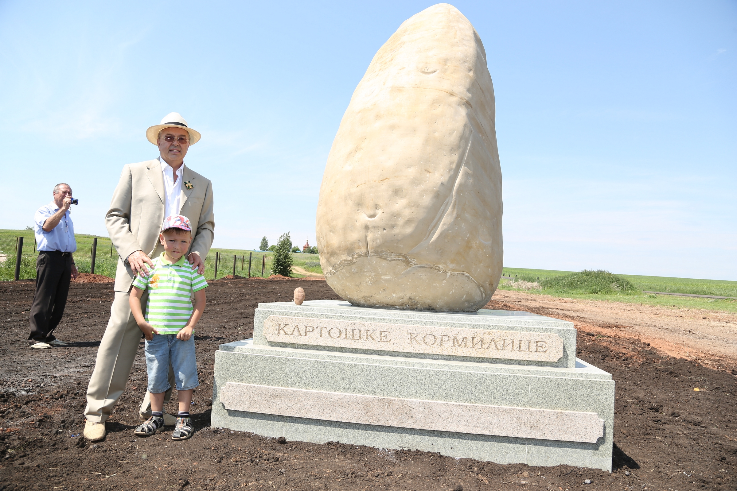 В 2015 году в Столяровке установлен памятник картошке, которая спасала село во все годы лихолетья